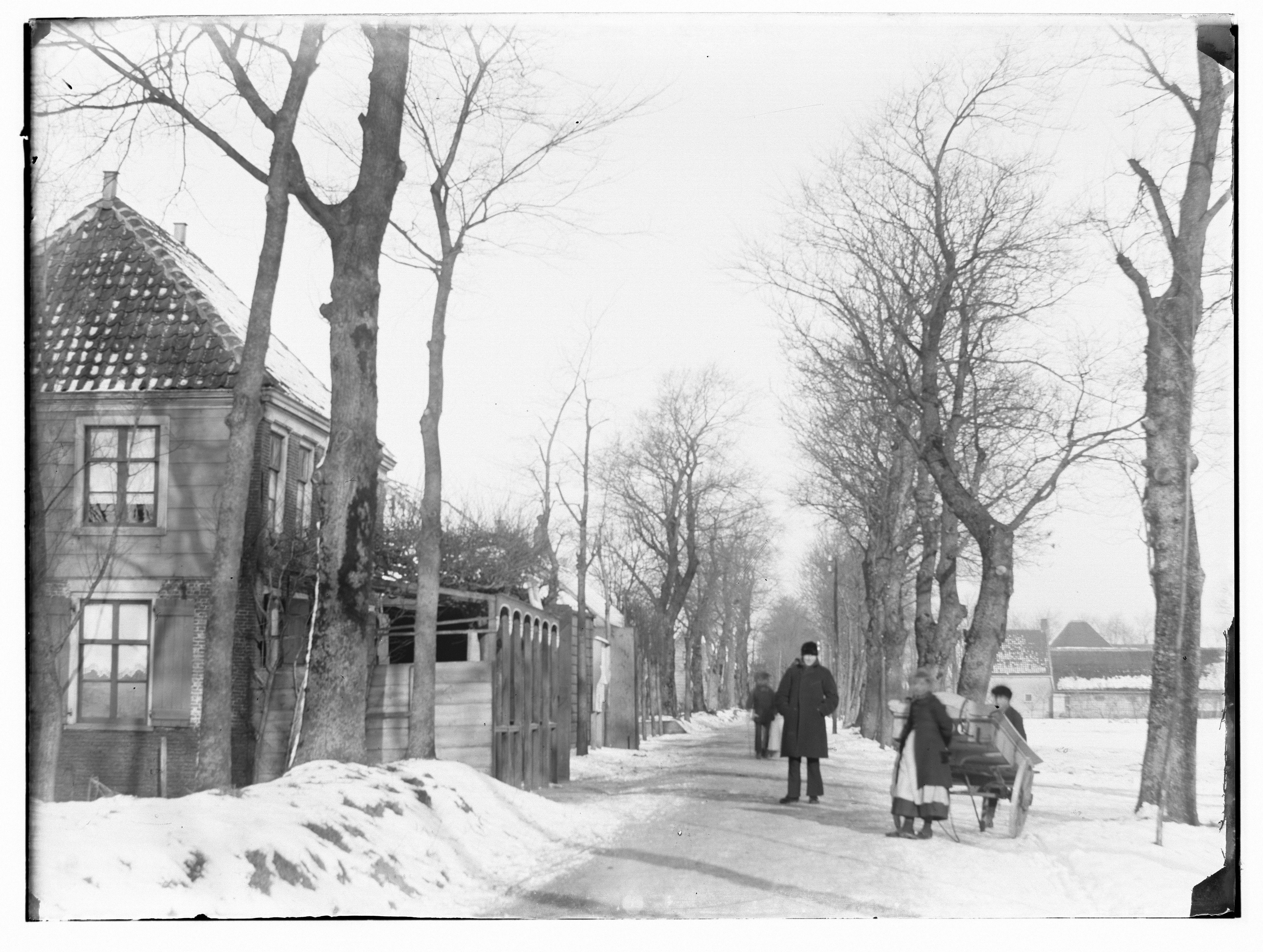 Beschrijving Amstelveenseweg Ter hoogte van Kalfjeslaan``, gezien in noordelijke richting. Rechts: boerderij"Nooit Volmaakt" (nr.109``,1922)``, later: nr.925 (1955). Sneeuwlandschap. Documenttype foto Vervaardiger Olie``, Jacob (1834-1905) Collectie Collectie Jacob Olie Jbz. Datering 1891 Geografische naam Amstelveenseweg Inventarissen Afbeeldingsbestand 010019000245 Generated with Dememorixer